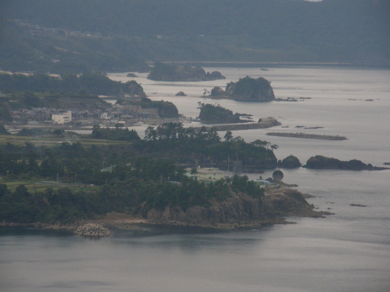 Tango-Matsushima,Tango peninsula 丹後松島 京丹後市丹後町平